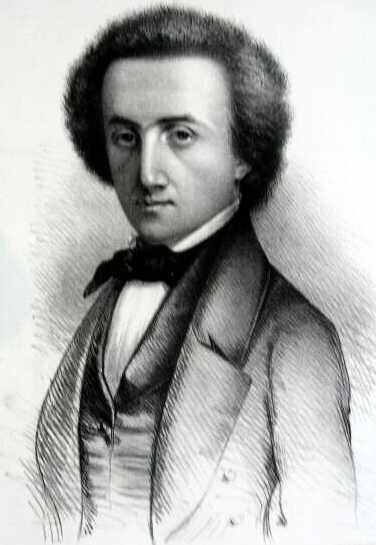 Ferdinand Lassalle (1825-1864)